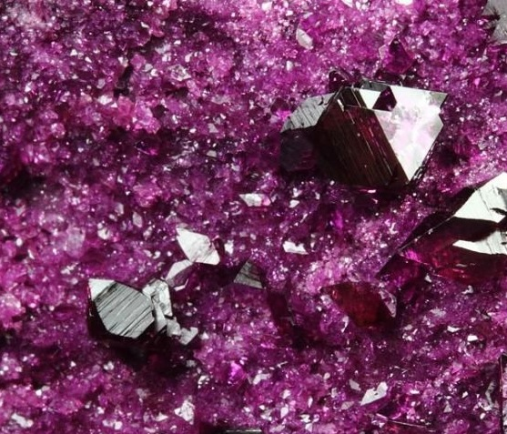 Kammererite collezione russia